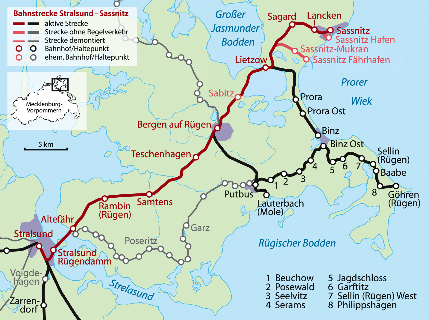 Karte der Bahnstrecke Stralsund–Sassnitz